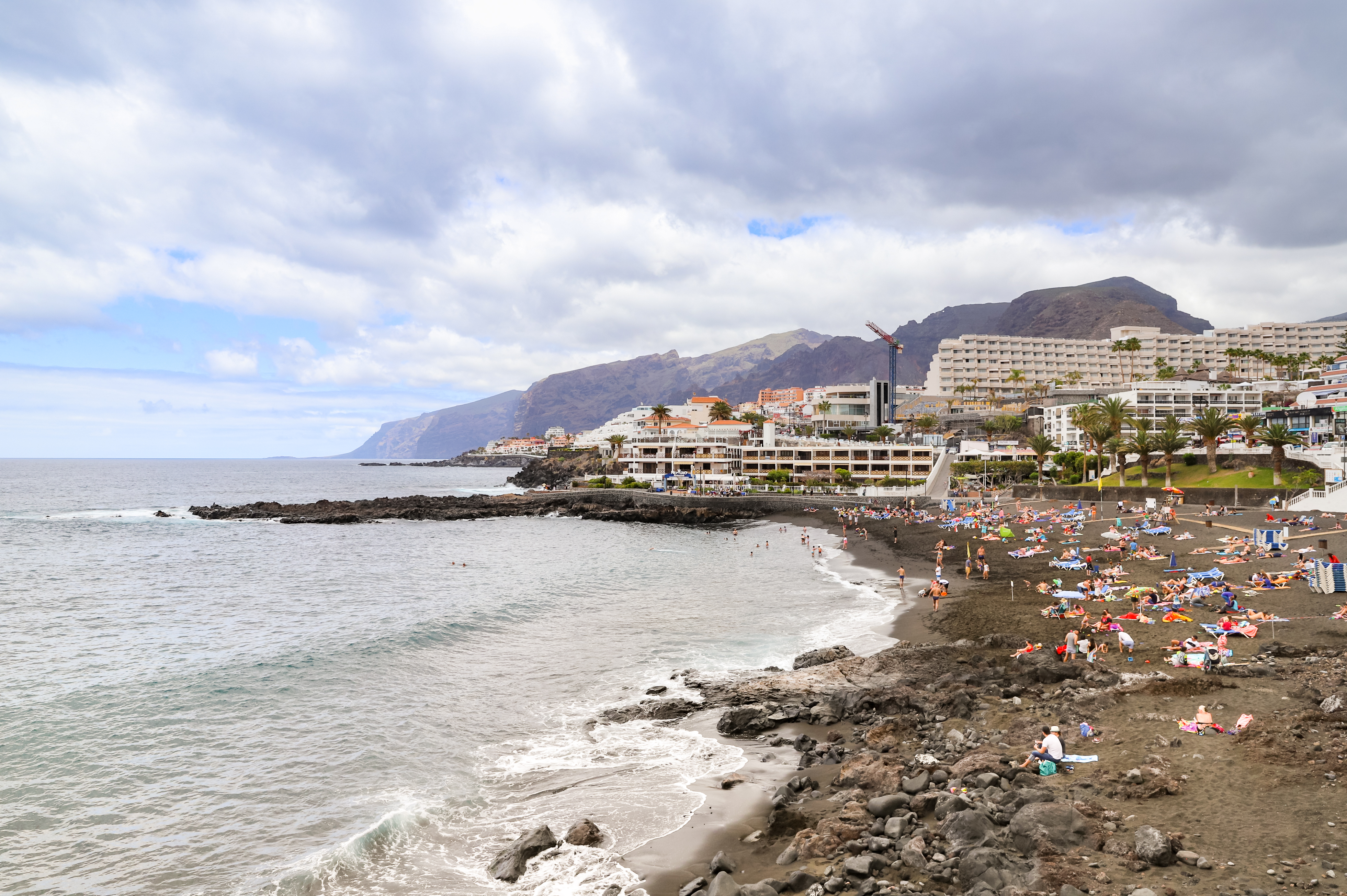 Tenerife